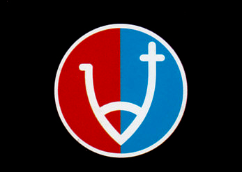 Hierro y divisa de la ganadería de lidia Valdellán. Provincia de León. España.